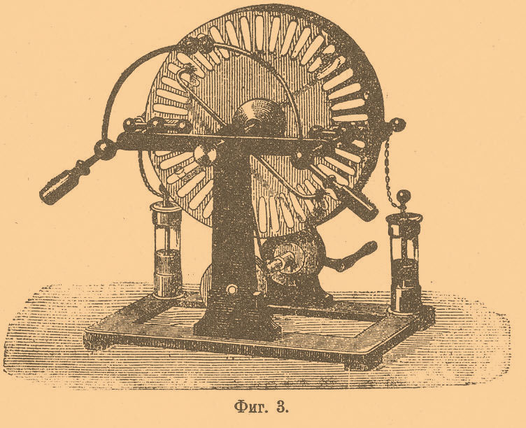 Иллюстрация к статье Электрическая машина из энциклопедии Брокгауза и Ефрона. Электрофорная машина Уимшерста